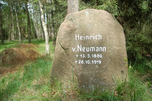 Pomnik Heinrich von Neumann w Puszczy Wiechlickiej - Bory Dolnośląskie